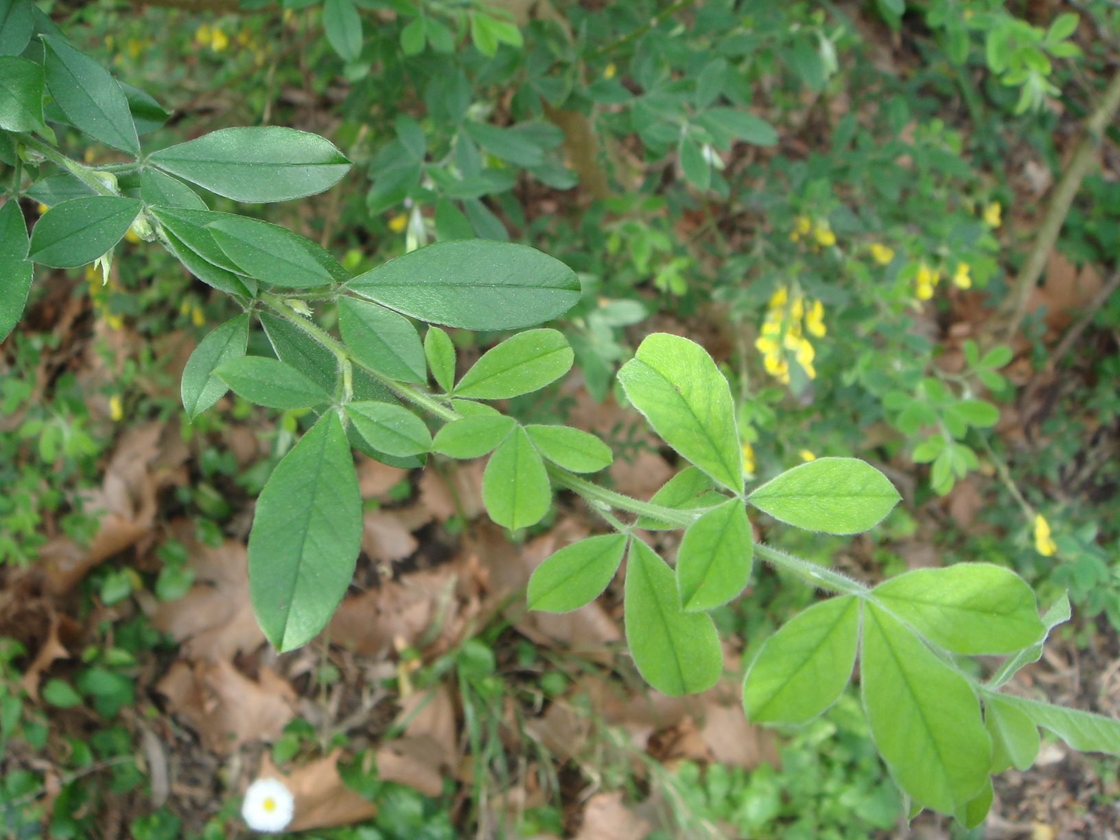 Cytisus villosus, Pourret. Ceuta, España